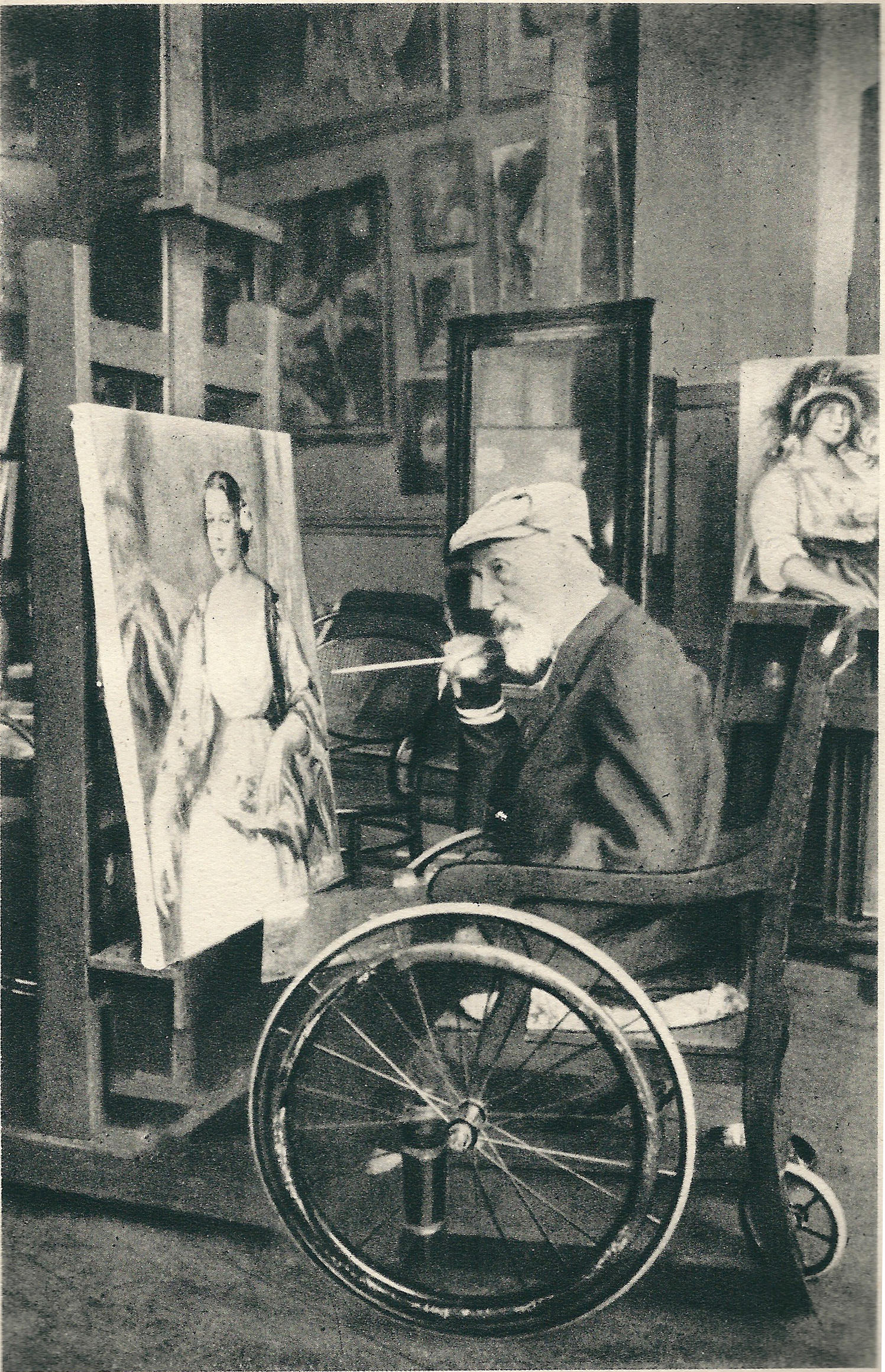 Auguste Renoir, dans son atelier en 1914.